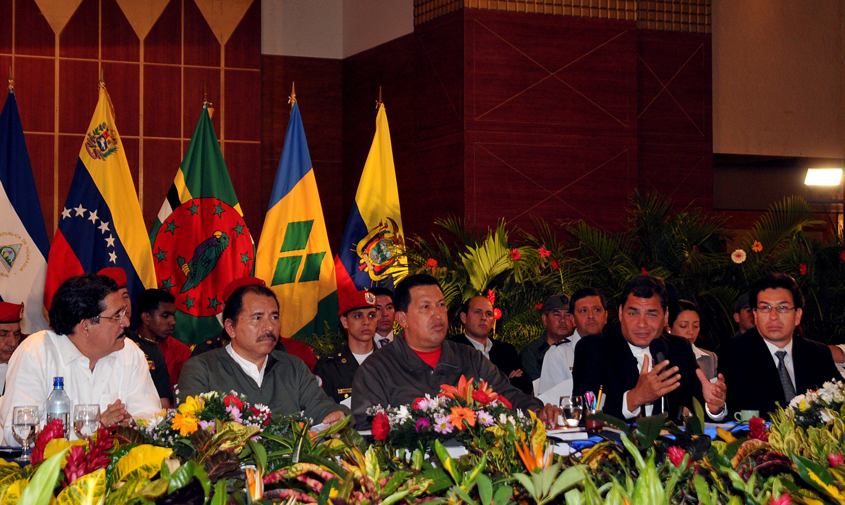 29 de junio de 2009